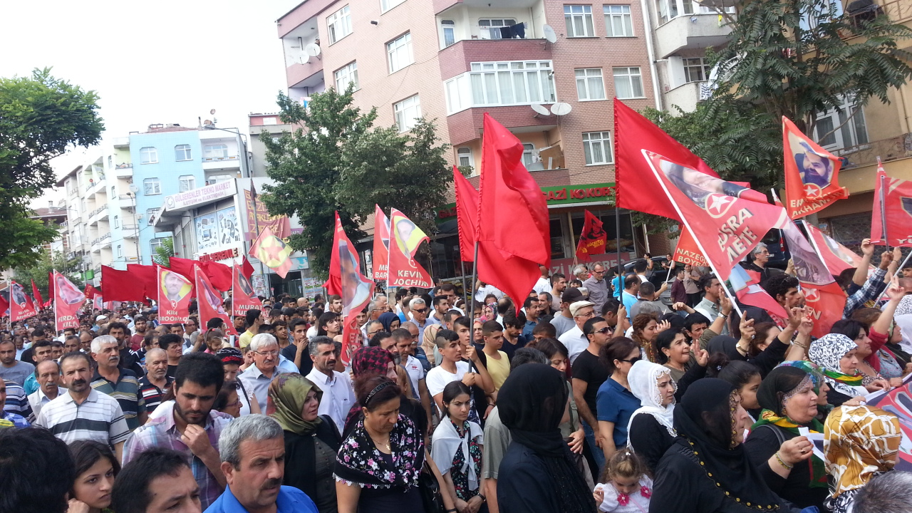 Kurdî: "Merasîma Oxirkirina Qurbanîyên Êrîşa Pirsûsê"